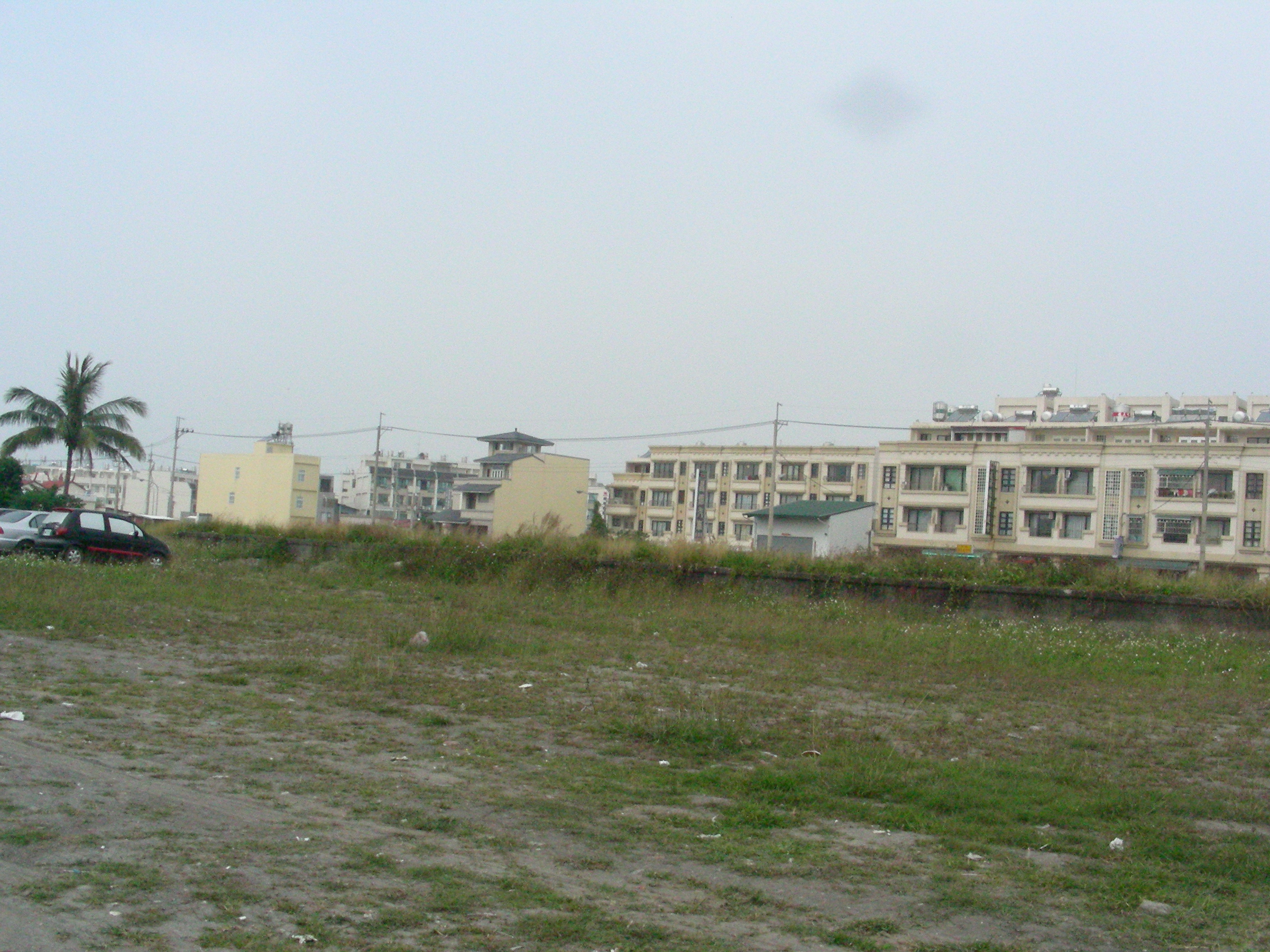 2008年東港站月台/長草了